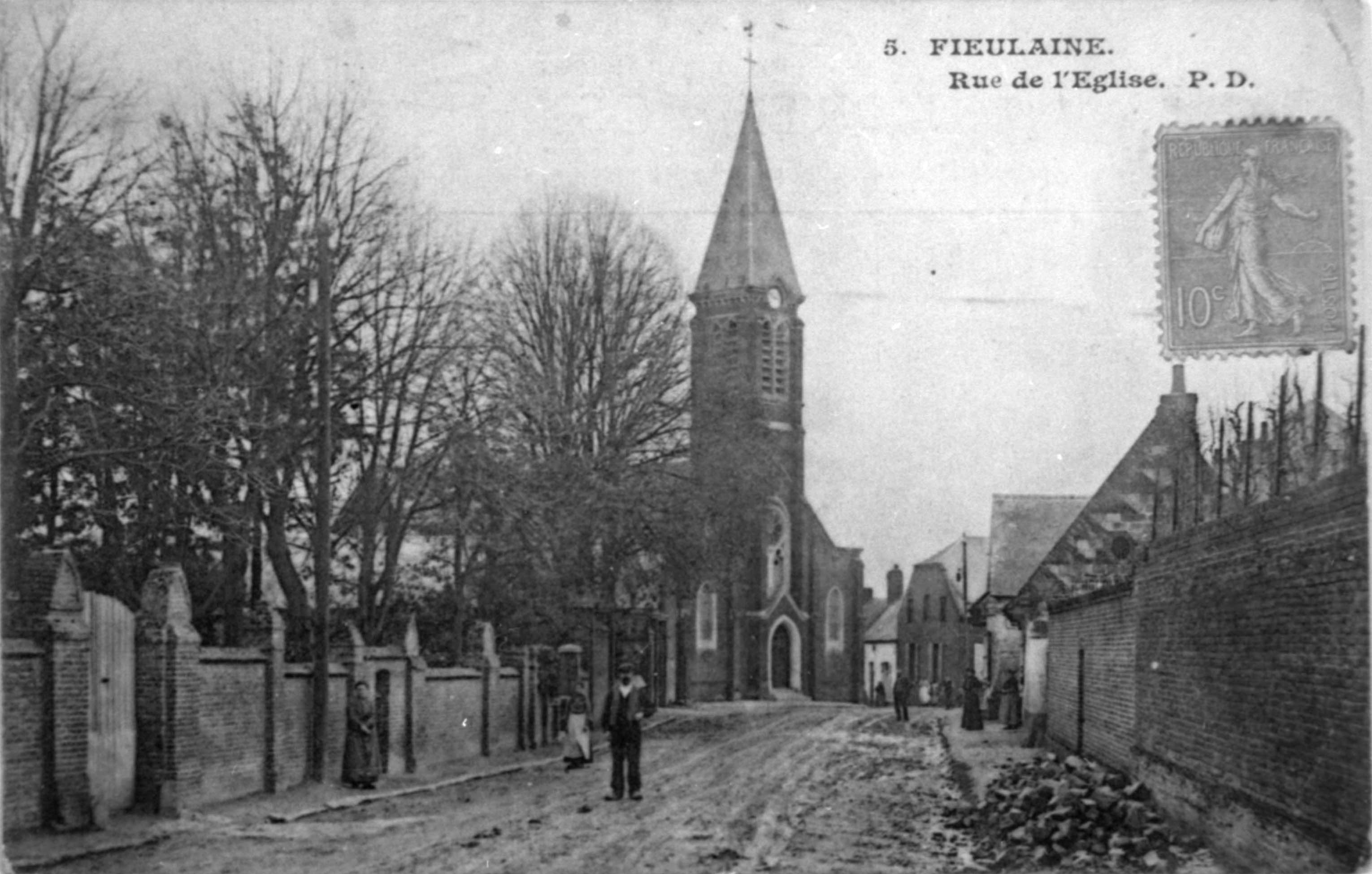 Eglise de Fieulaine début 20 eme siècle